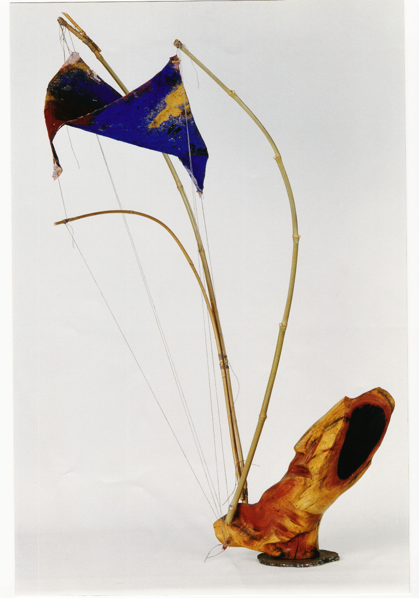 Escultura realizada con madera tallada, bambú y tela con pigmentos puros.